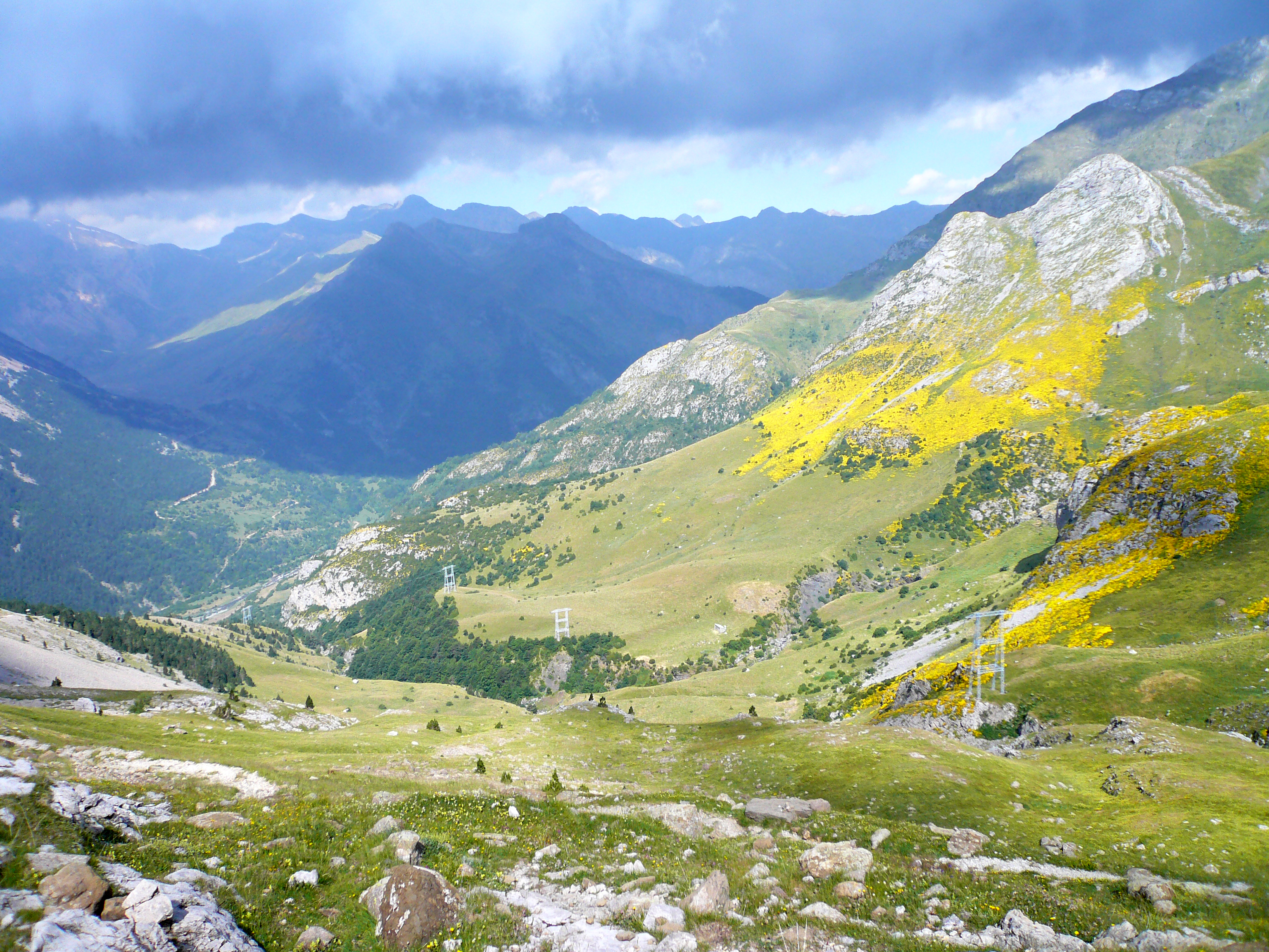 Vallée de Bujaruelo vue depuis le port de Boucharo.